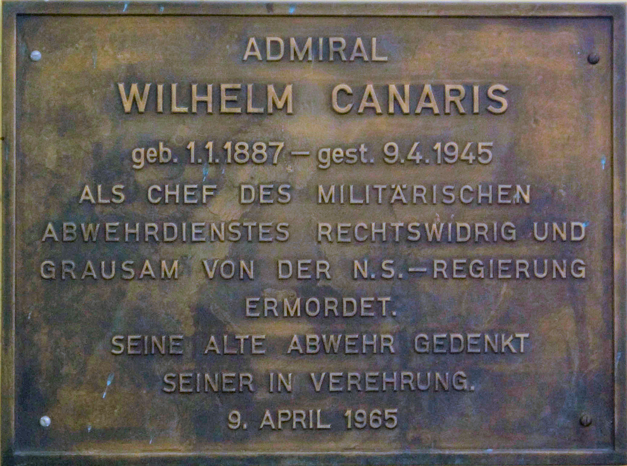 Gedenkttafel für Admiral canaris im KZ Flossenbürg, Germany